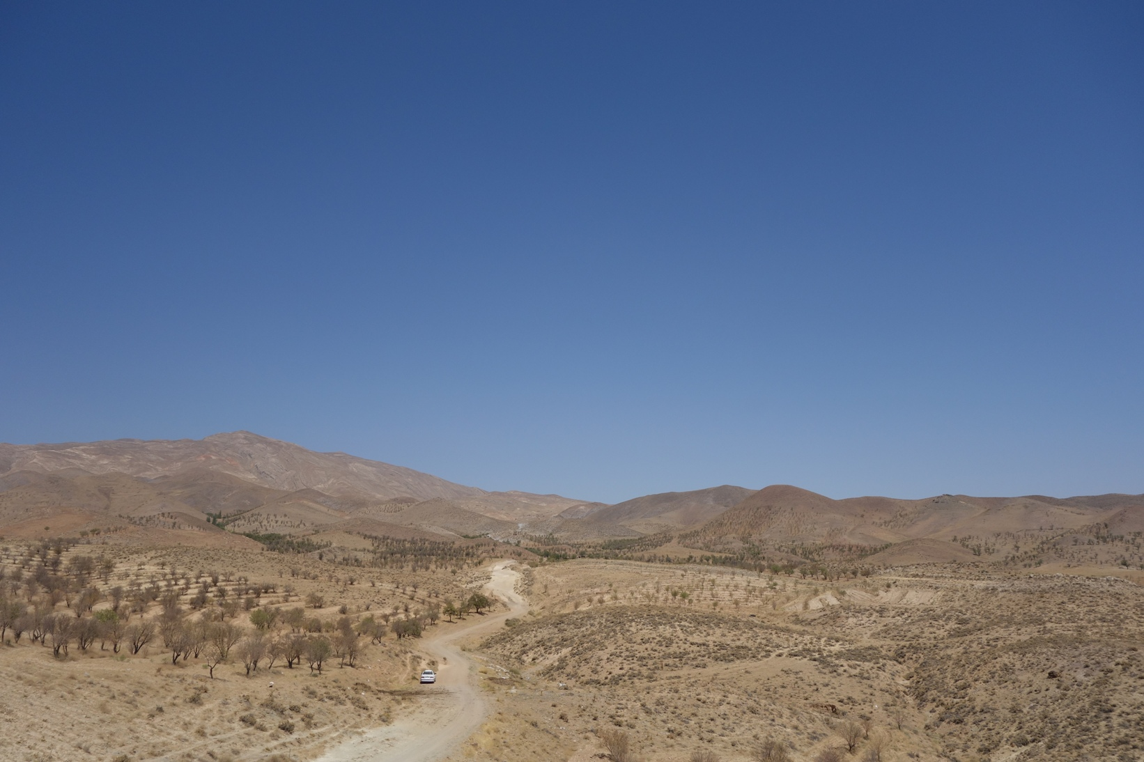 مسیر به سمت کوه های شاه جهان از روستای نوده